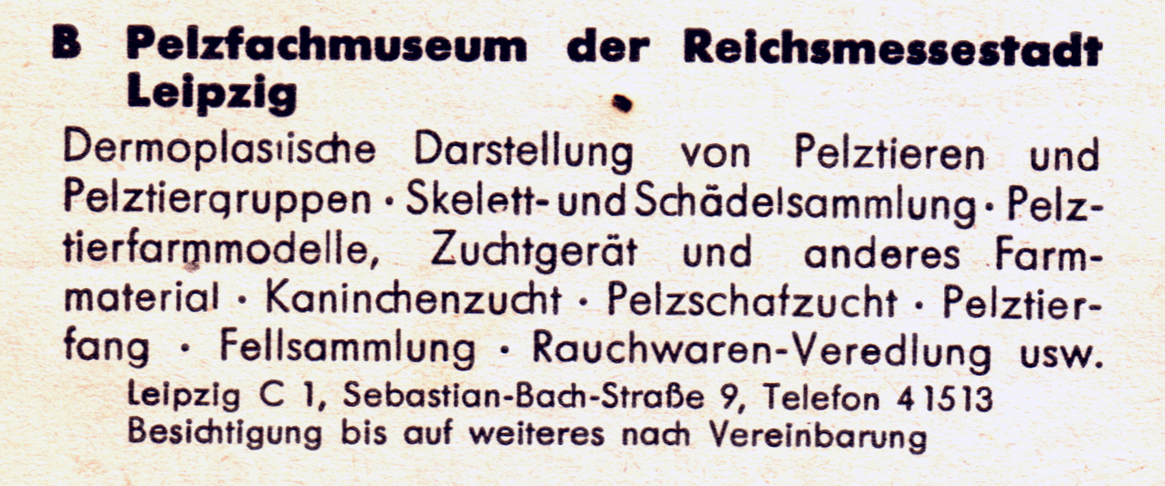 Pelzfachmuseum der Reichsmessestadt Leipzig. In: „Der Rauchwarenmarkt“ vom 2. Januar 1943 (Kriegsjahr), Rubrik Forschung und Unterricht im Rauchwaren- und Pelzfach. Sebastian-Bach-Straße 9, Leipzig